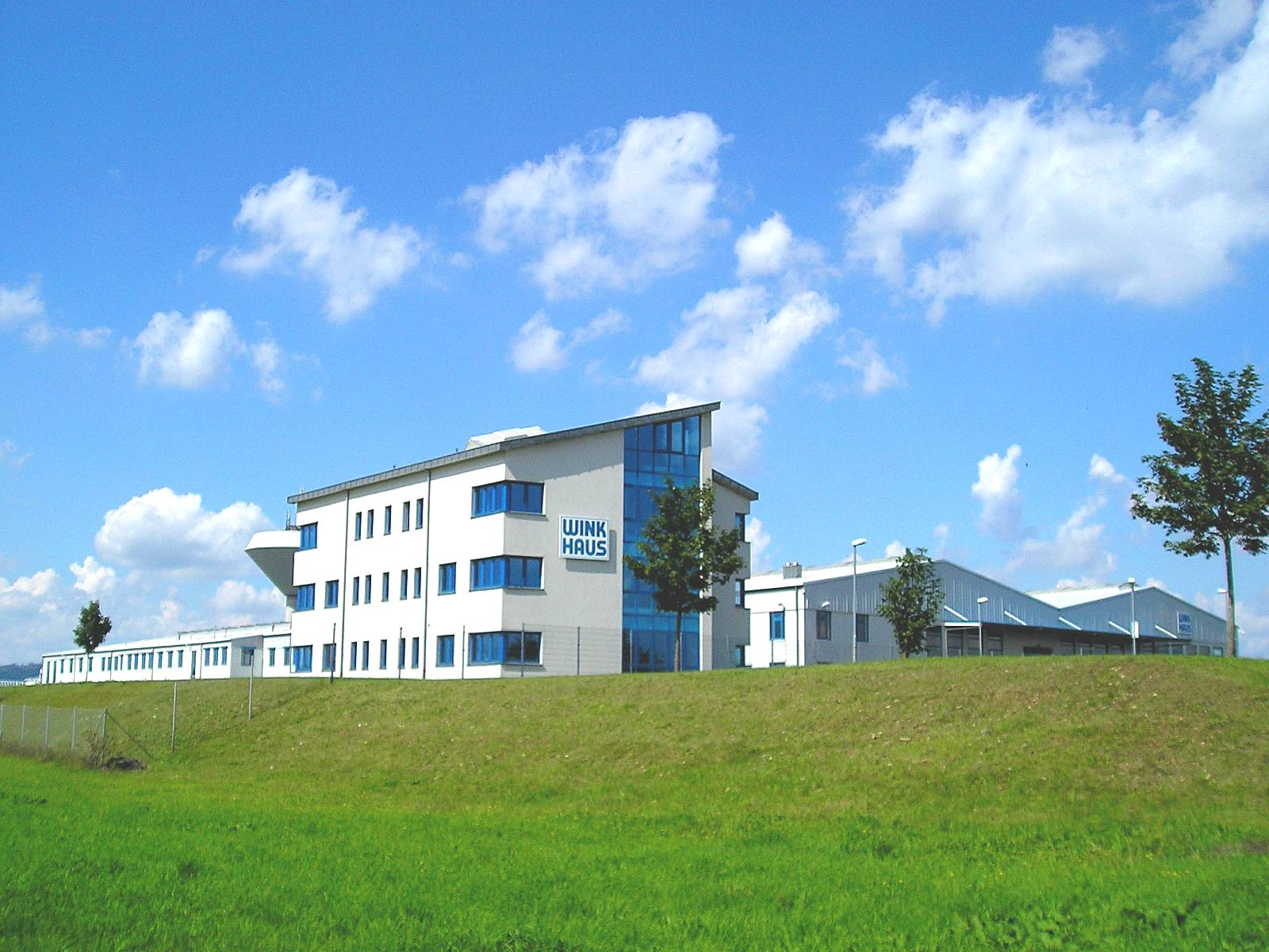 Firma "Winkhaus Türtechnik GmbH" in Meiningen